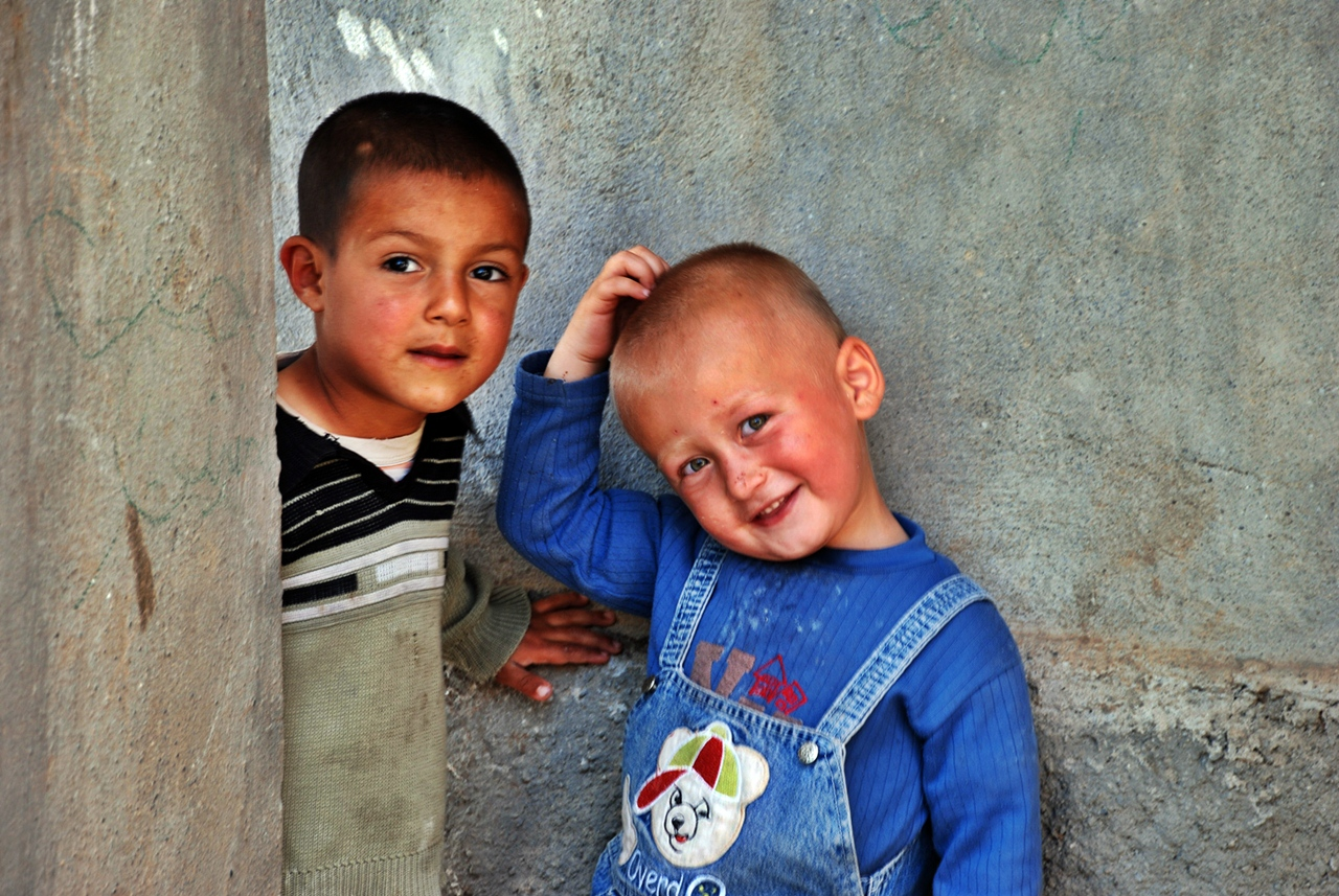 Kurdî: Ji Hicetiyê